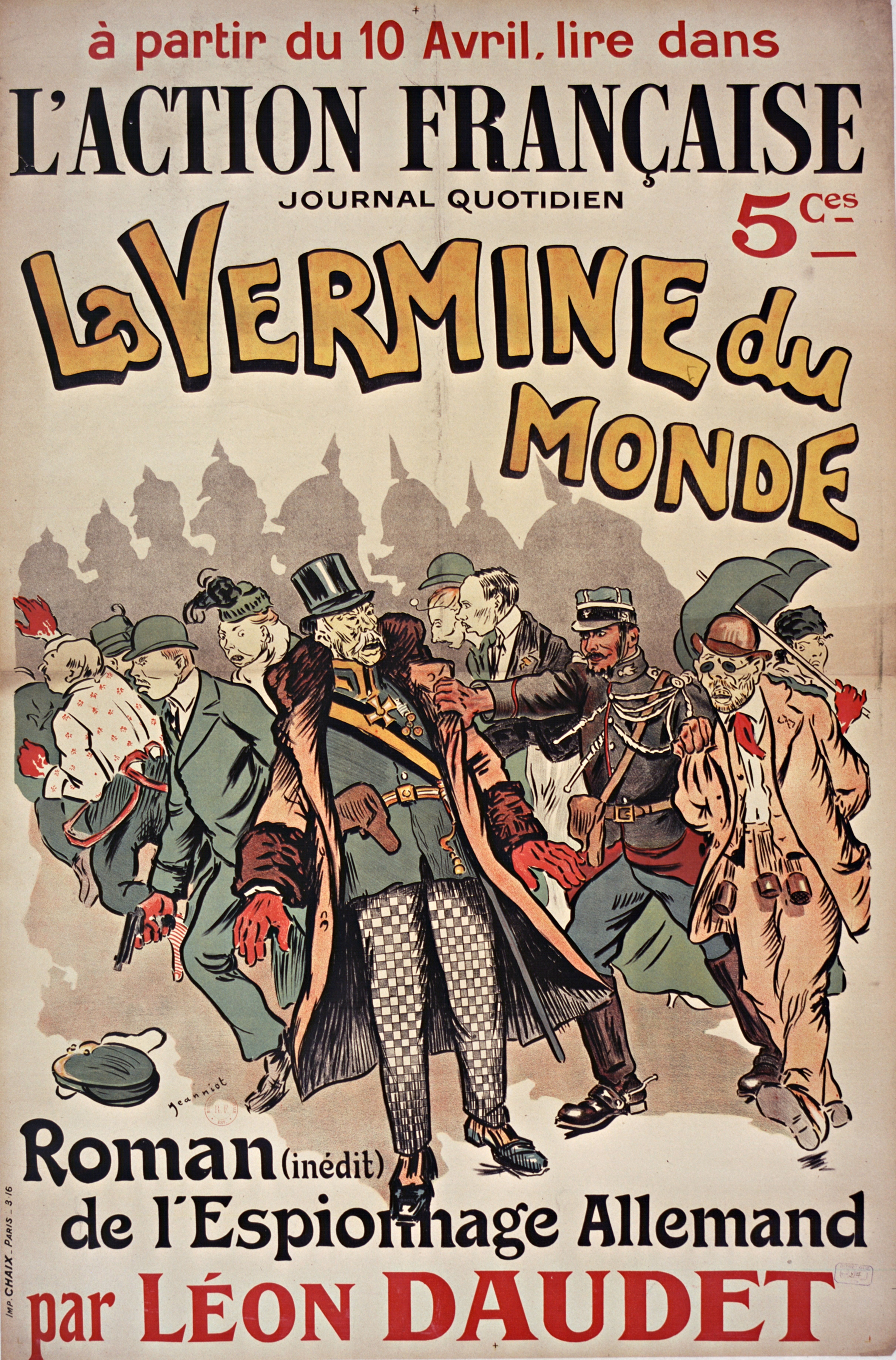 A partir du 10 avril, lire dans l'Action française, journal quotidien, 5 c[entim]es, la Vermine du monde, roman (inédit) de l'espionnage allemand par Léon Daudet : [affiche]